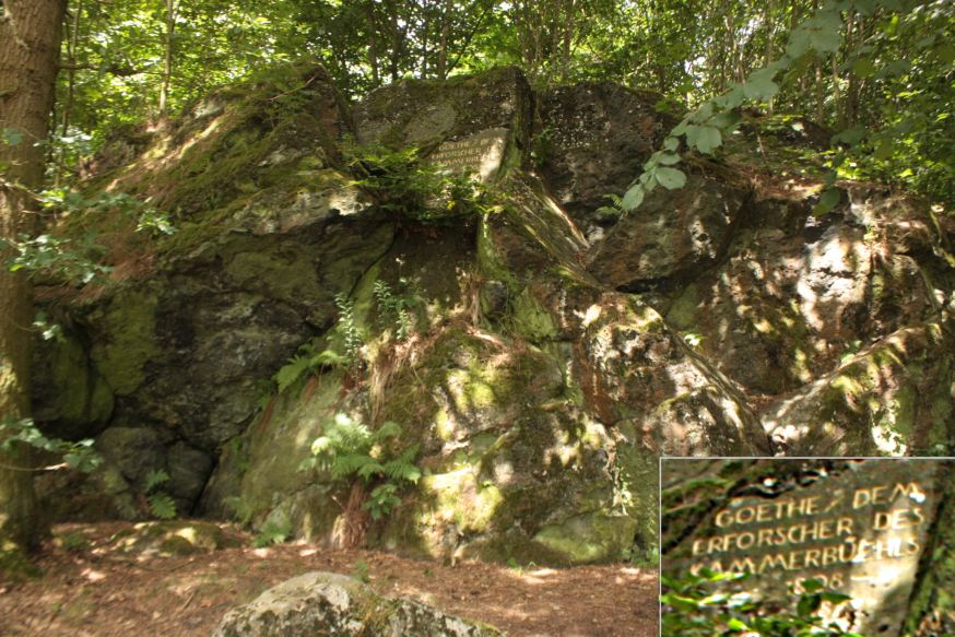 Komorní Hůrka, sopka, pohled na skálu s deskou a německým textem. červenec 2011